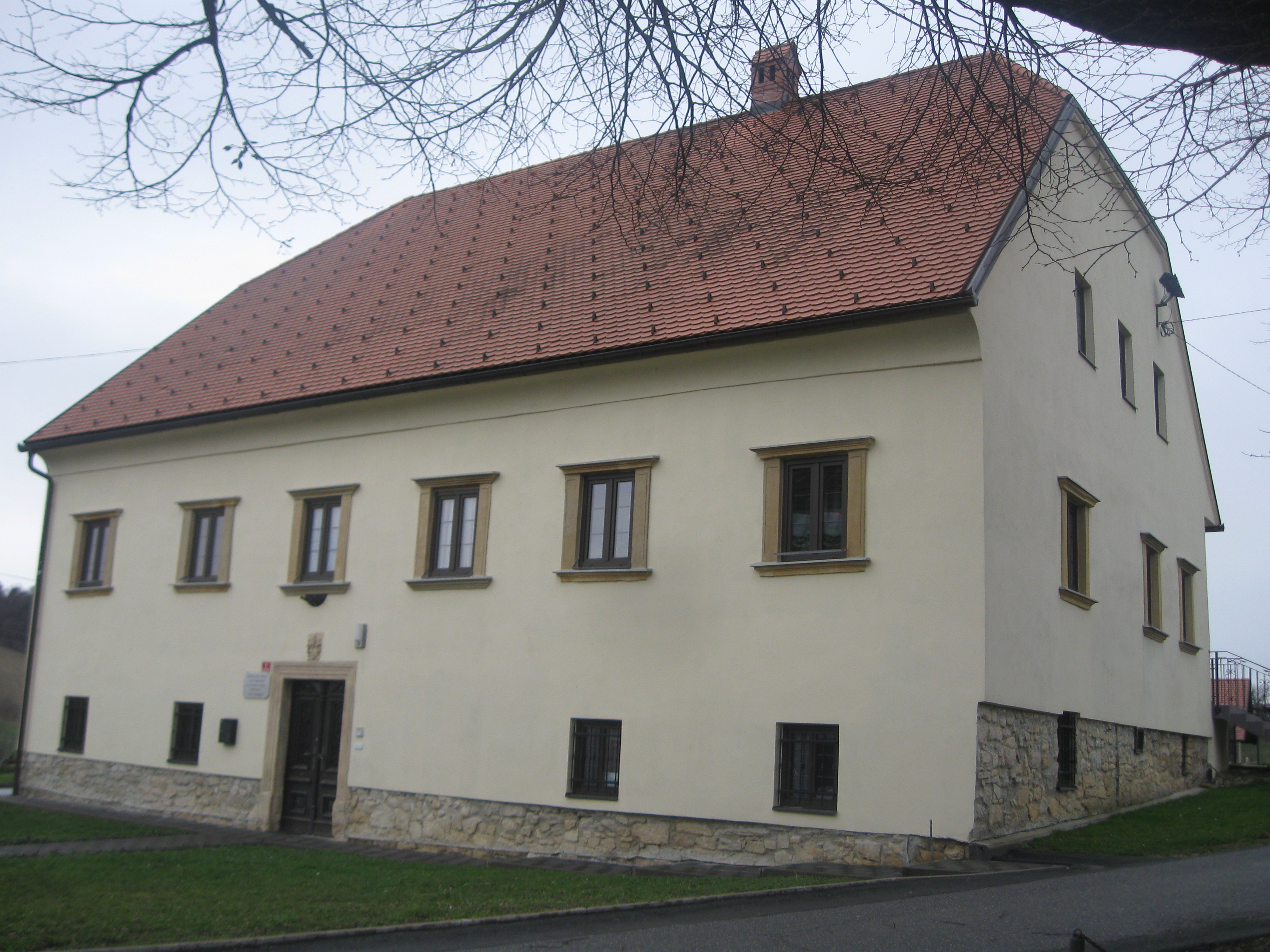 Župnišče sv. Benedikta v Benediktu v Slovenskih goricah. Zgrajeno leta 1796.